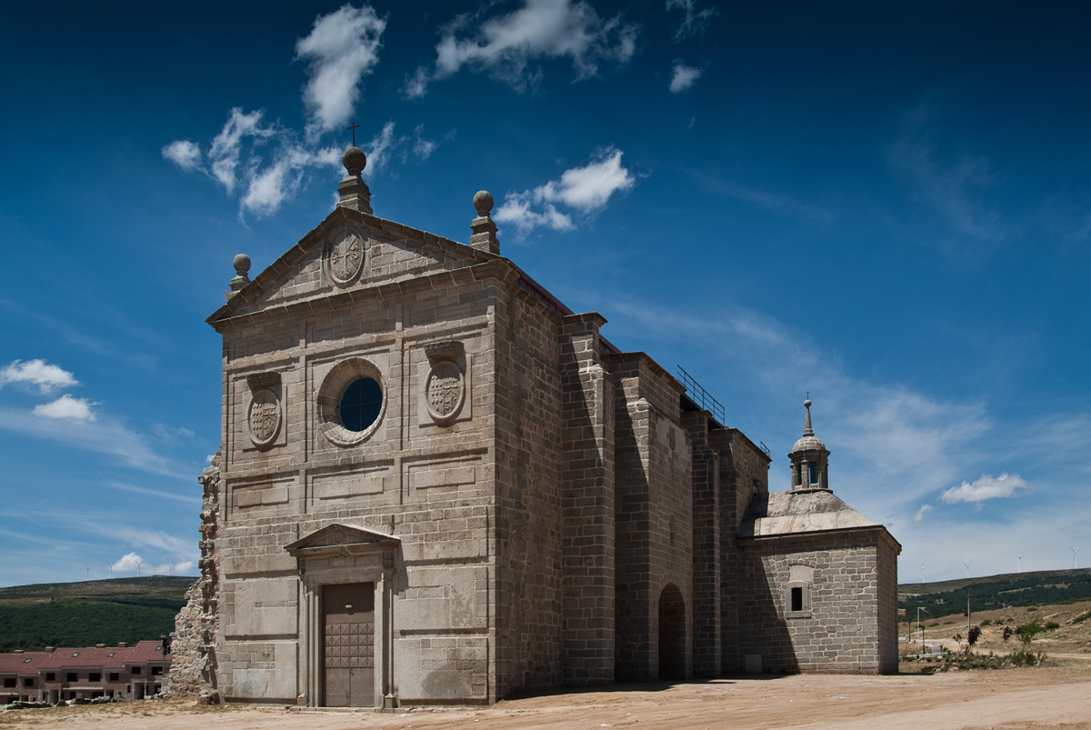 Convento de Santo Domingo y San Pablo